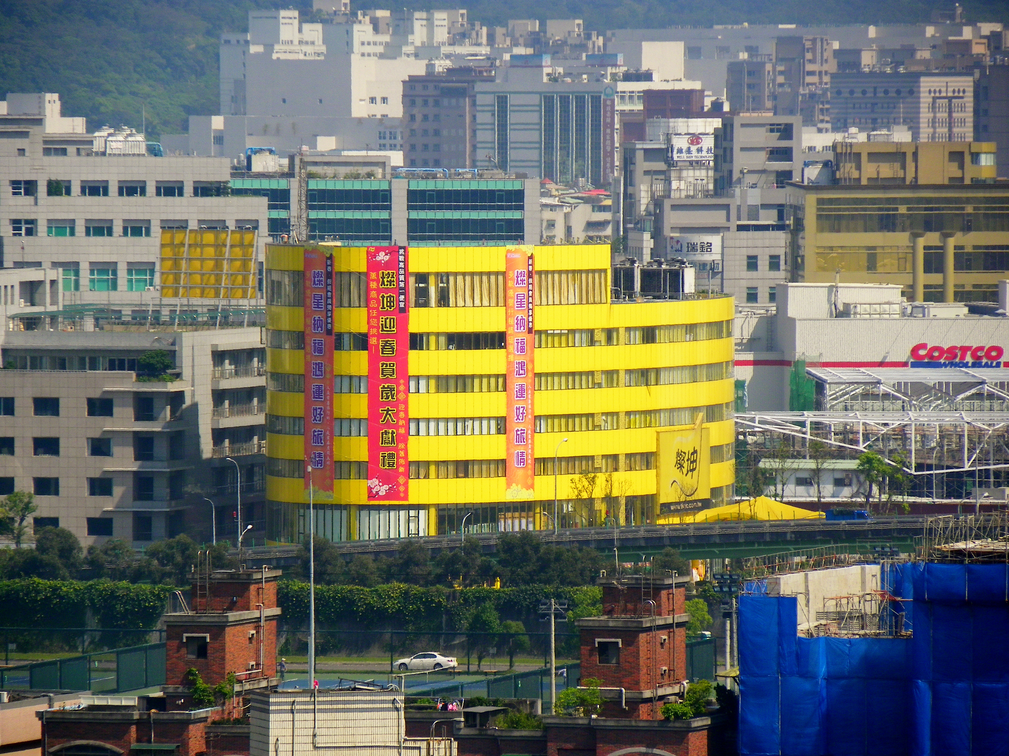 燦坤集團總部與燦坤3C內湖旗艦店，攝於民生社區新光民生廣場屋頂。地址：臺北市內湖區堤頂大道一段331號。